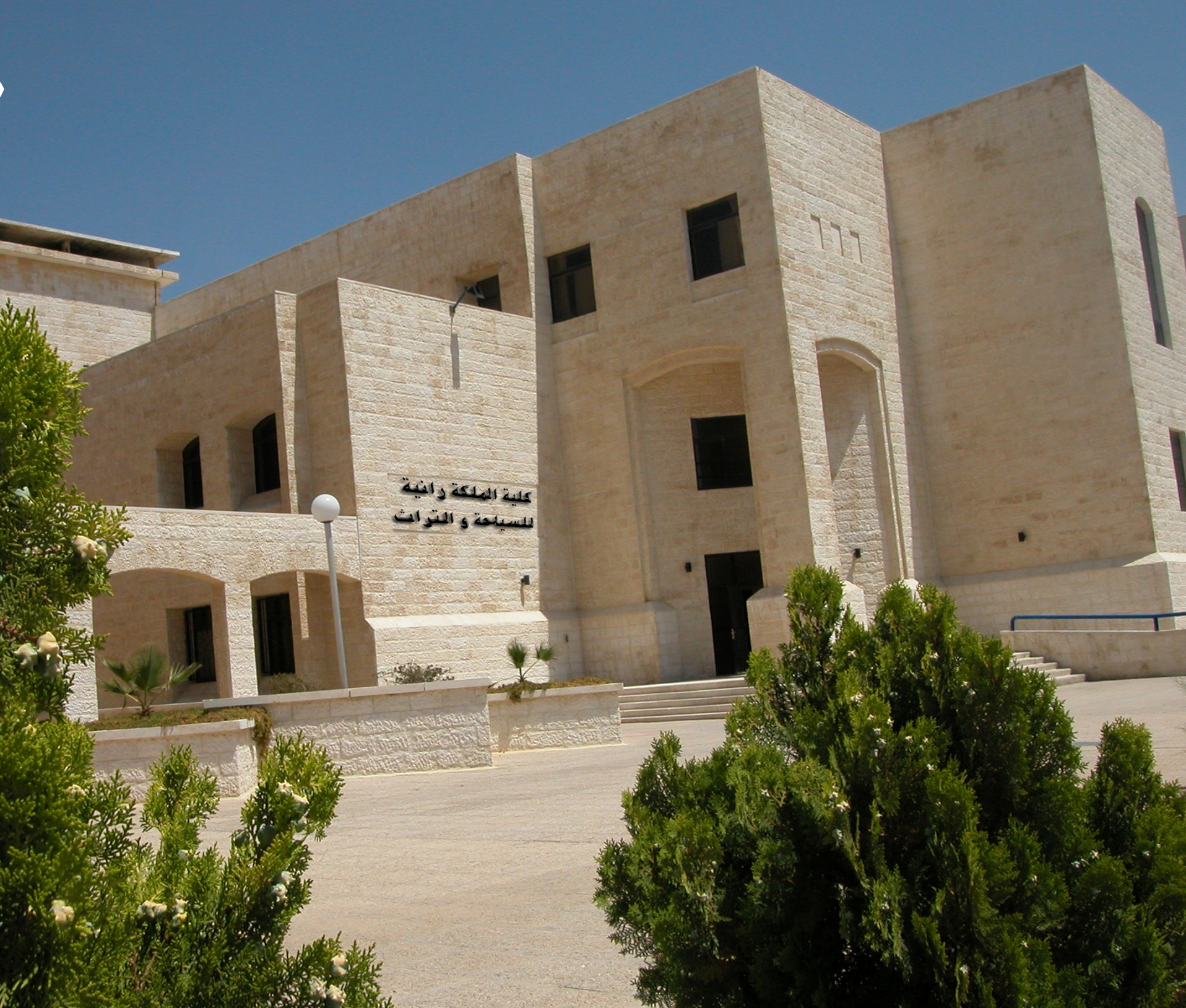 صور للجامعة